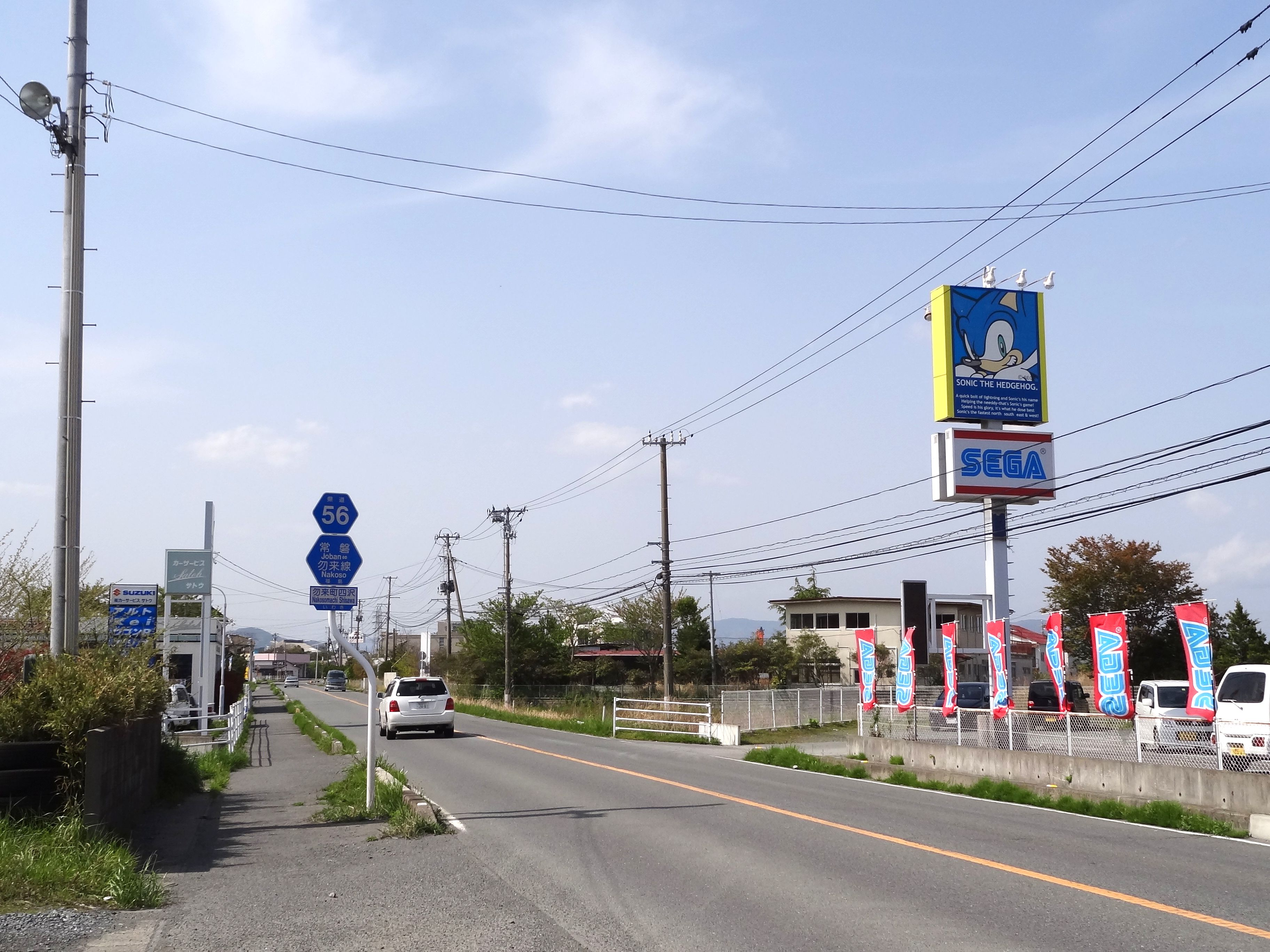 福島県道56号 いわき市勿来町付近